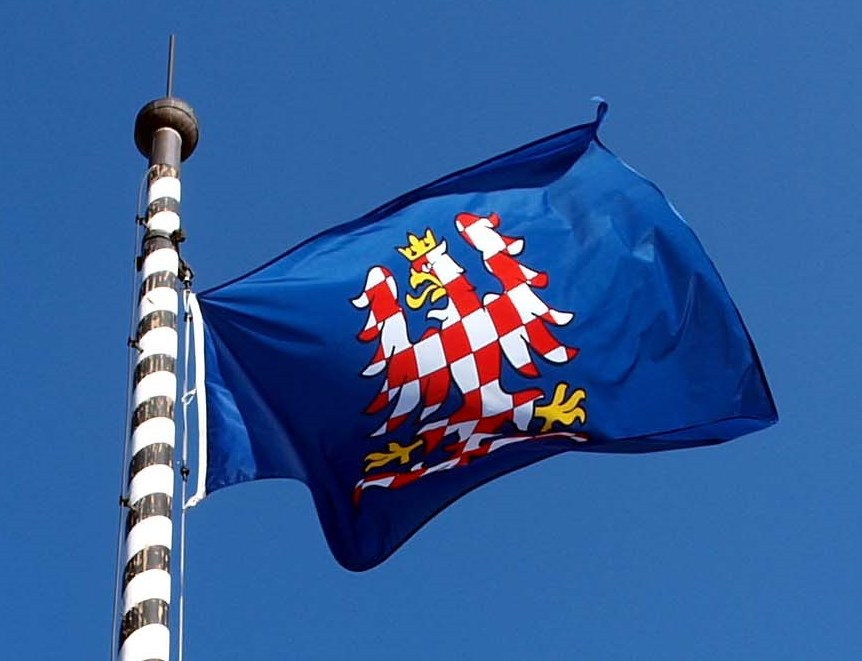 Moravská orlice